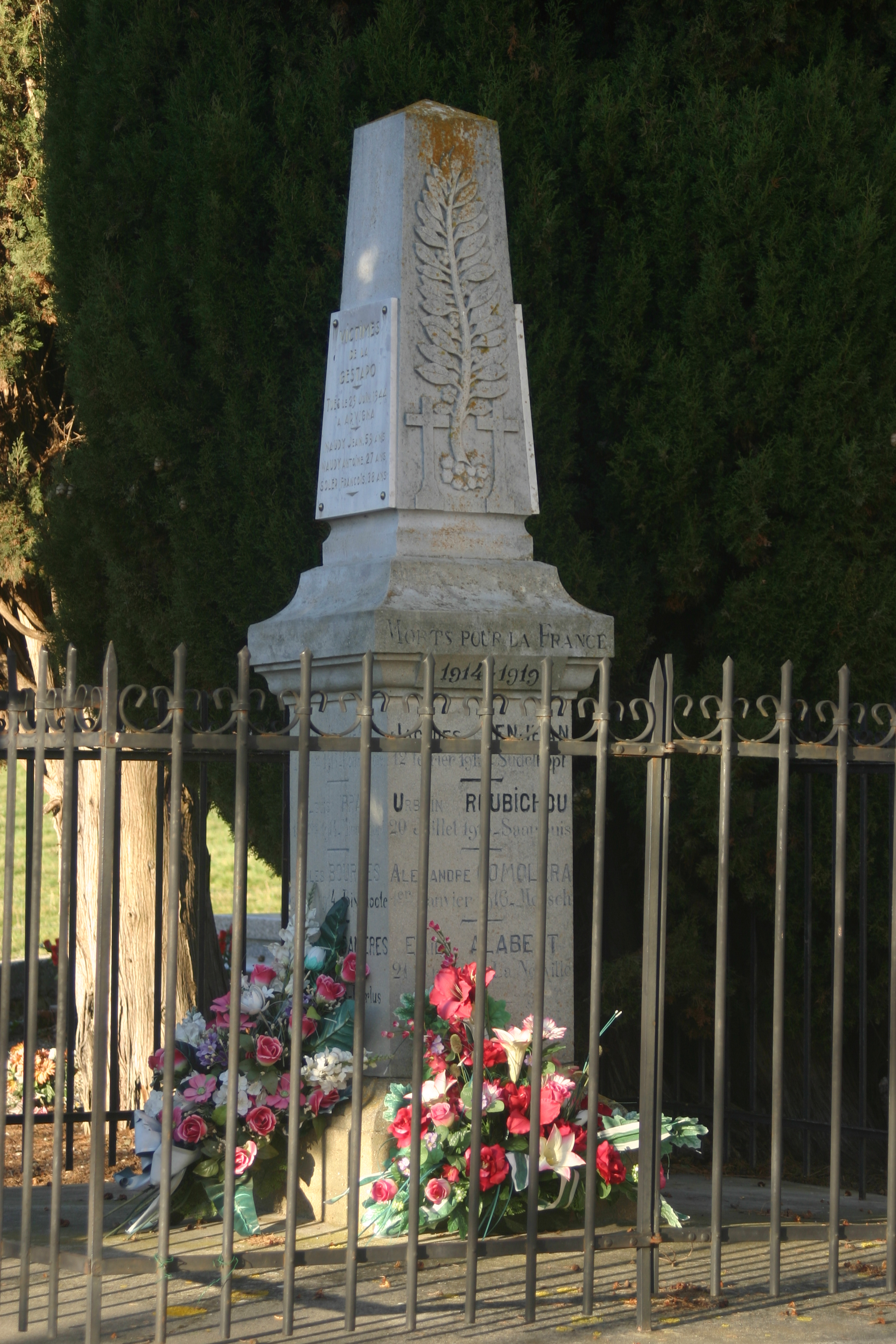 Monument aux morts d'Arvigna (09).